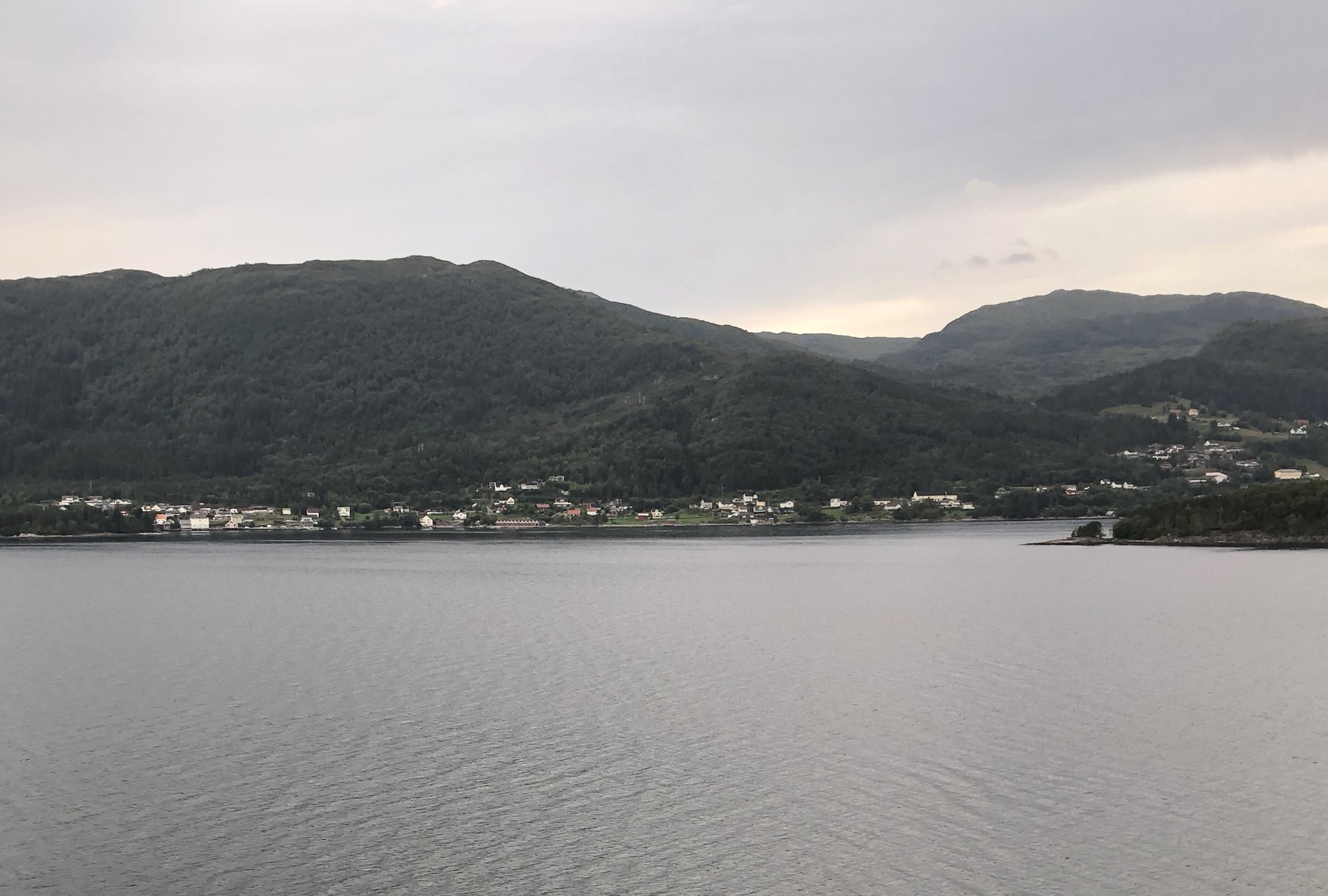 Blick auf Bryggja 2019